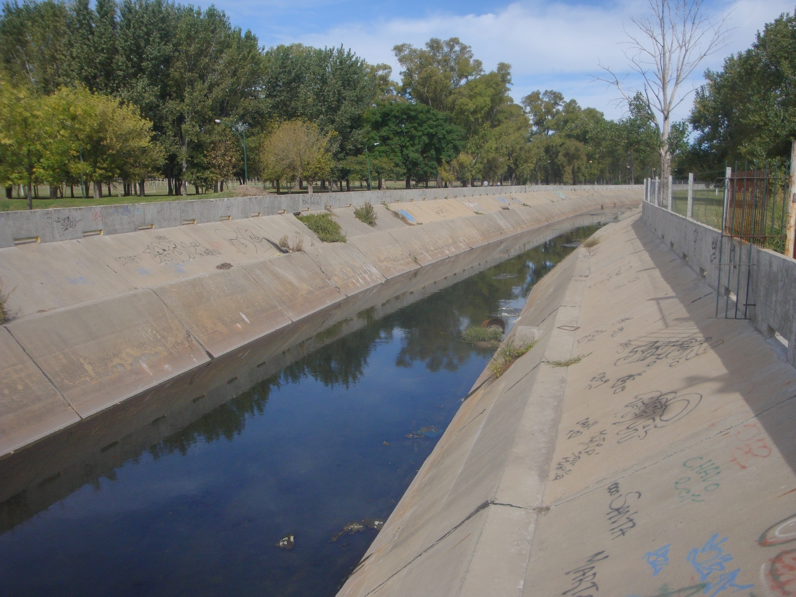 Arroyo del Rey atravesando el Parque Municipal de Lomas de Zamora.